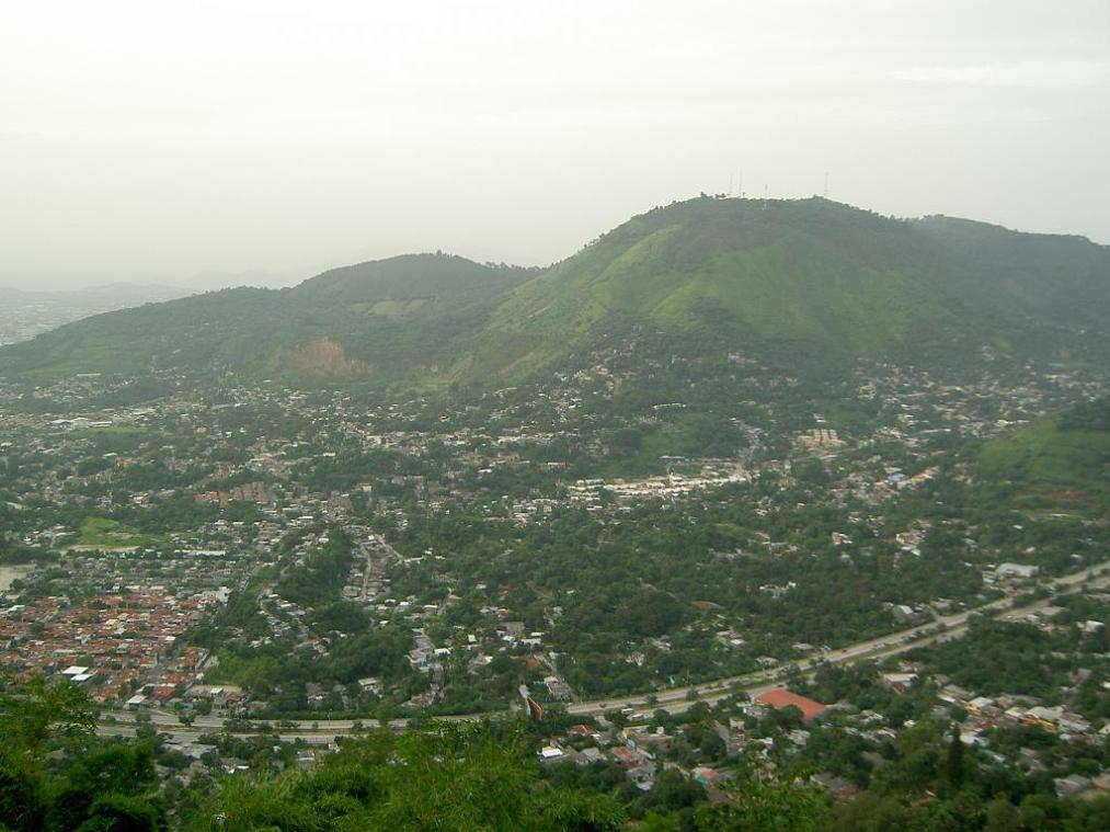 San Marcos city San Salvador El Salvador